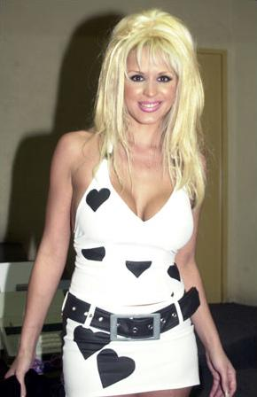 Roxana Martínez en el Foro 3 de Televisa.